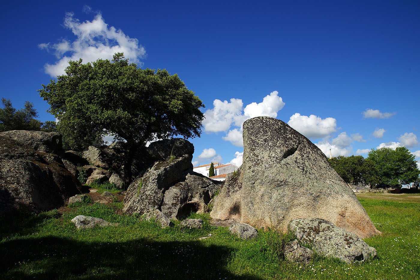 Necrópolis visigoda, Arroyo de la Luz, provincia de Cáceres, España.